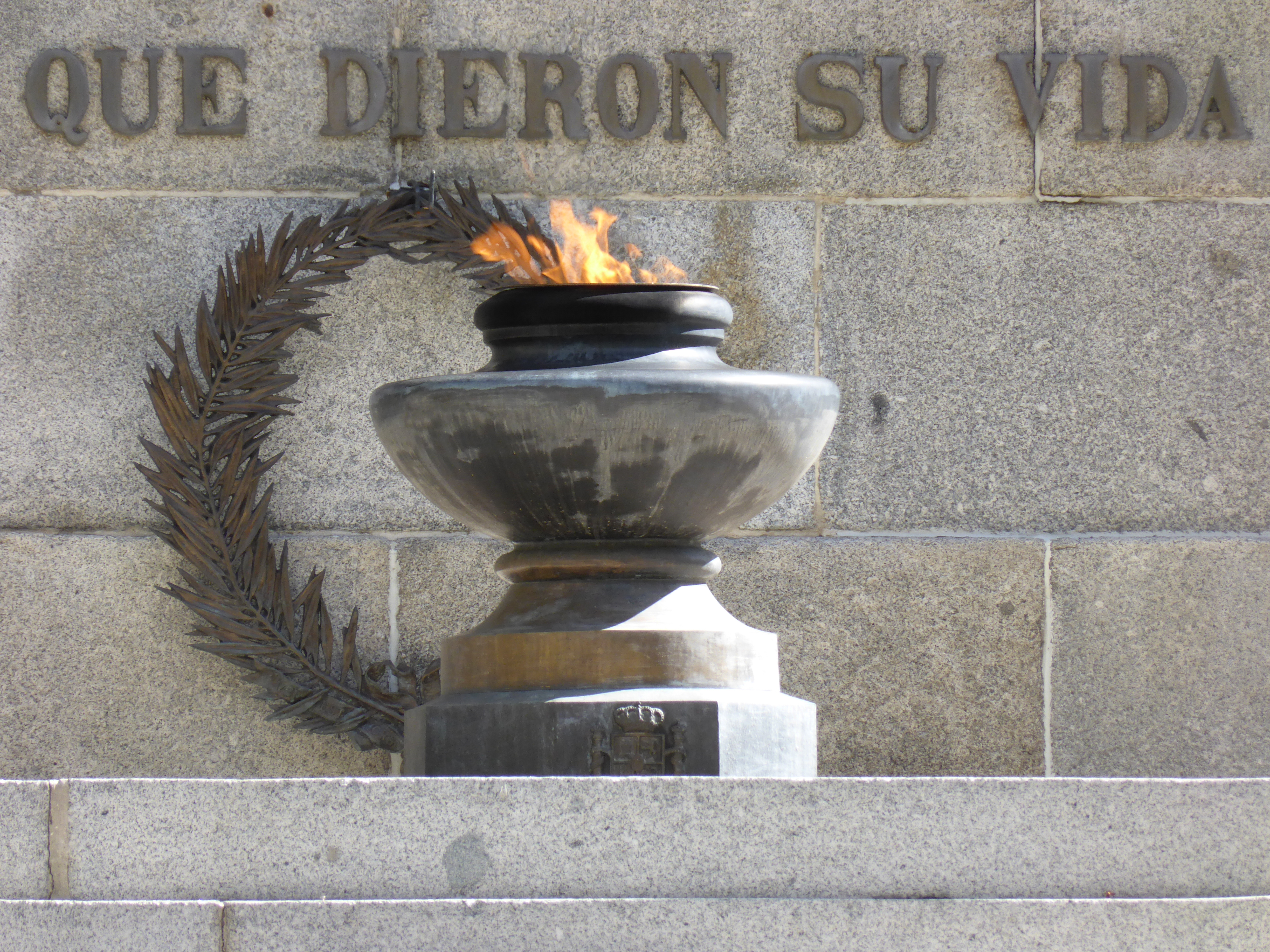 Pebetero con una llama que arde permanentemente, en "honor a todos los que dieron su vida por España". Monumento a los Caídos por España, llamado antes de 1985 Obelisco o Monumento a los Héroes del Dos de Mayo.